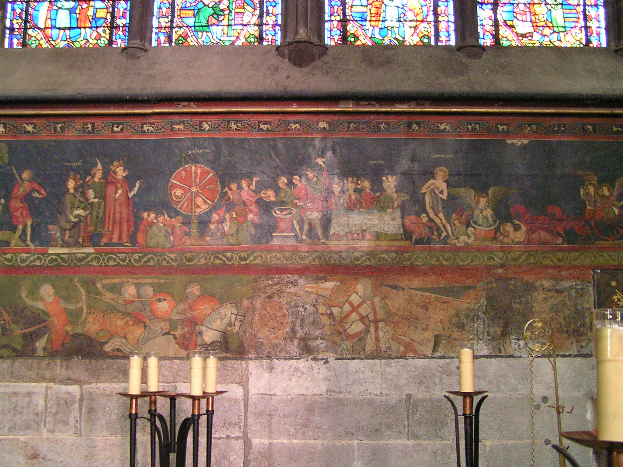 peintures à l'intérieur de la cathédrale de Clermont-Ferrand